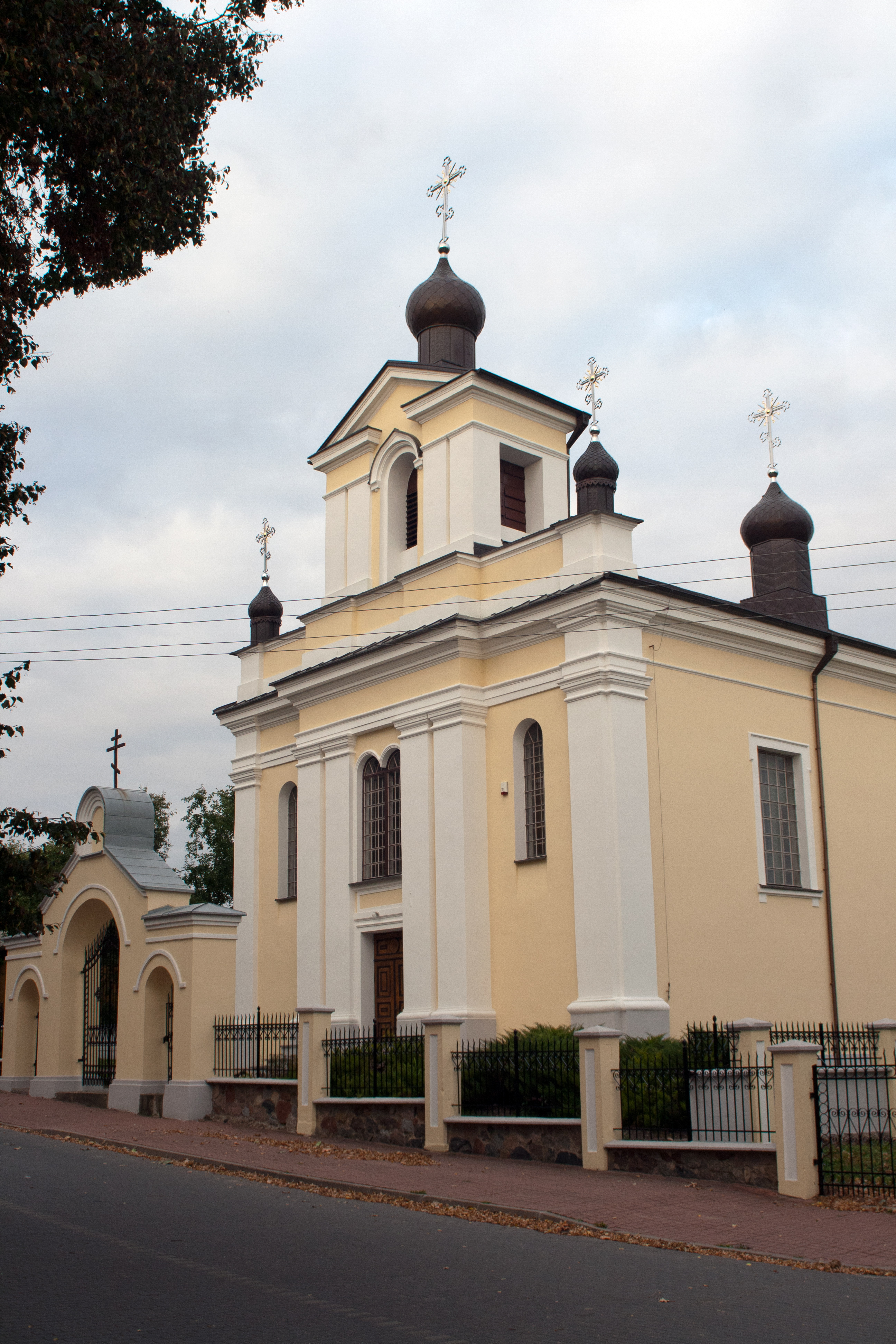 Drohiczyn, Cerkiew greko-kat., ob. prawosławna par. św. Mikołaja Cudotwórcy, mur., 1792